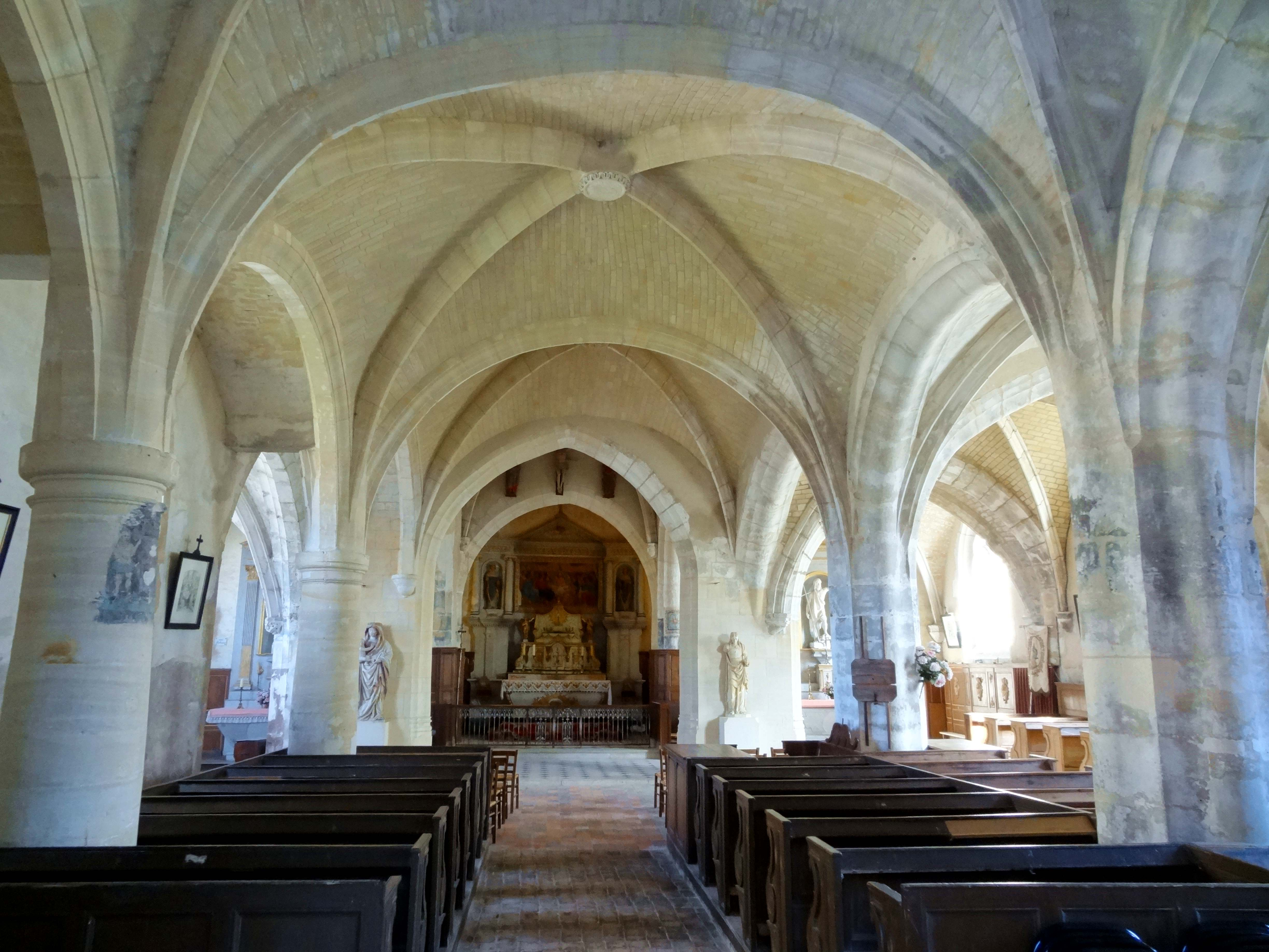 Intérieur de l'église - voir titre.